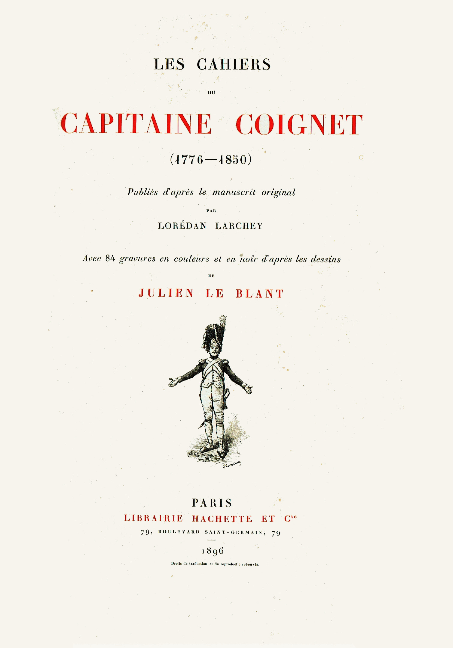 Illustration des « cahiers du capitaine Coignet » ; par Julien Le Blant